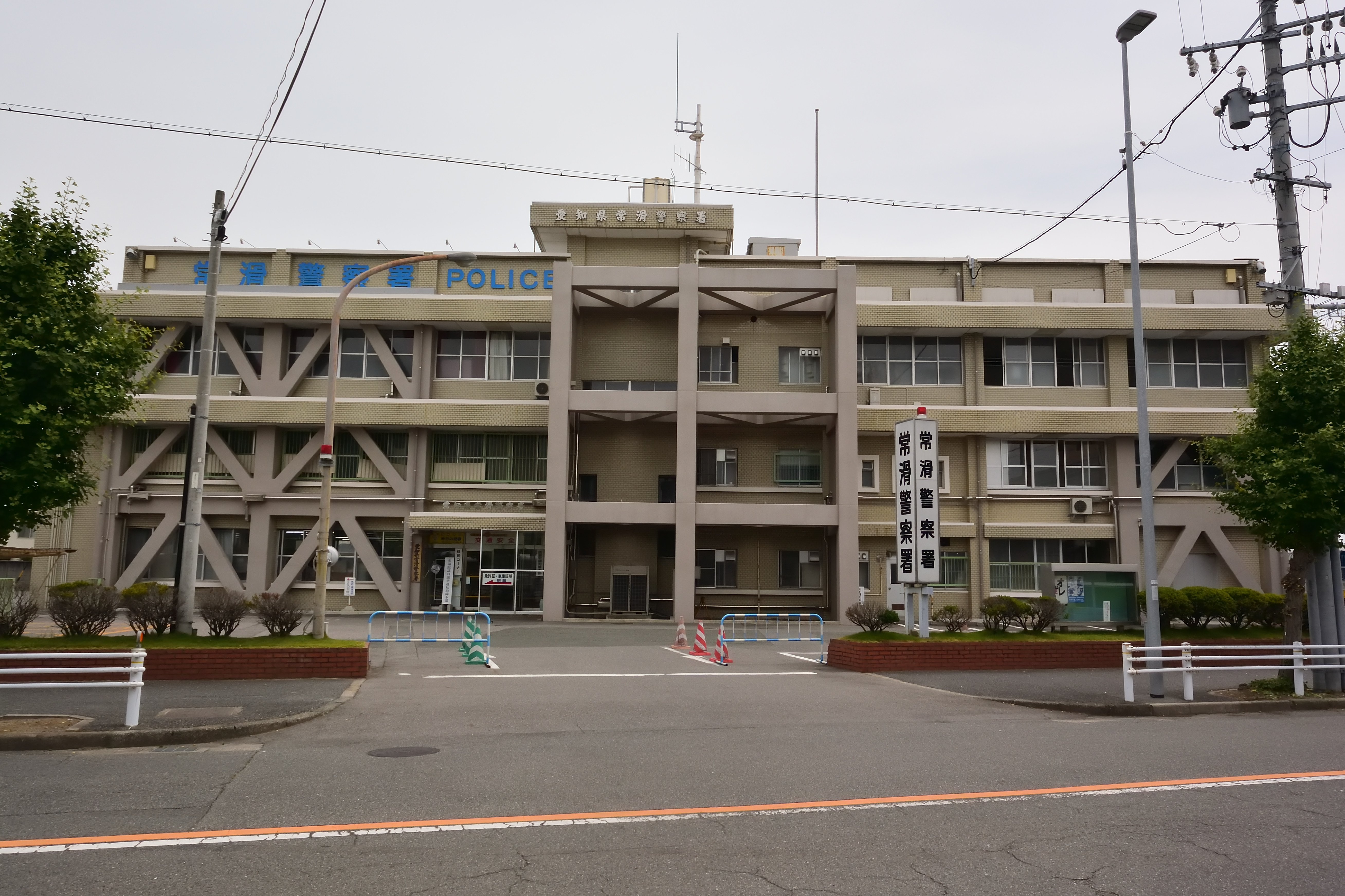 常滑警察署外観